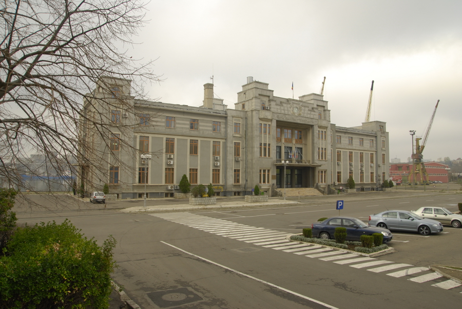 Fosta Gară maritimă Constanta